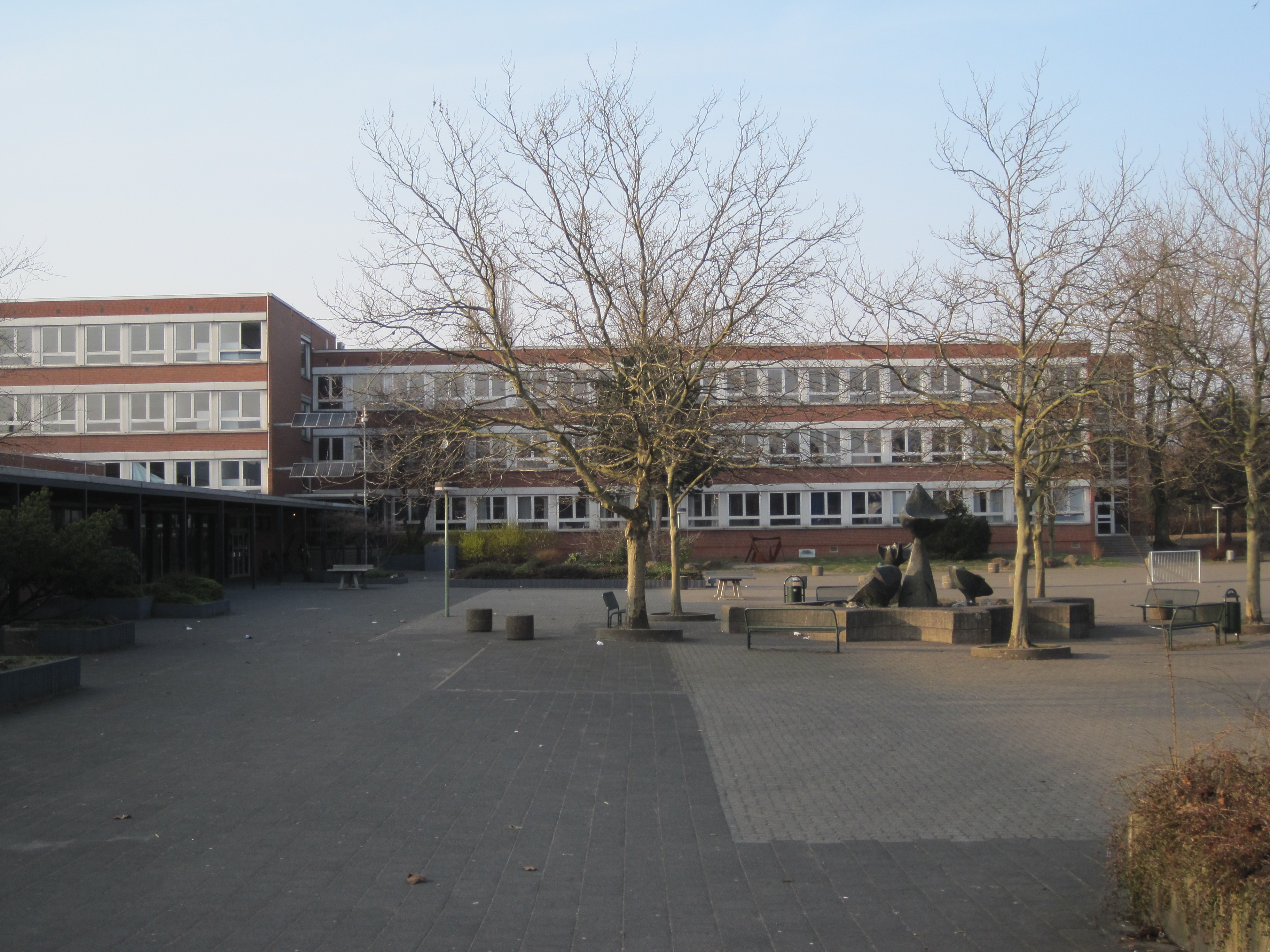 Das Foto zeigt das Galilei-Gymnasium Hamm in Hamm-Bockum-Hövel.